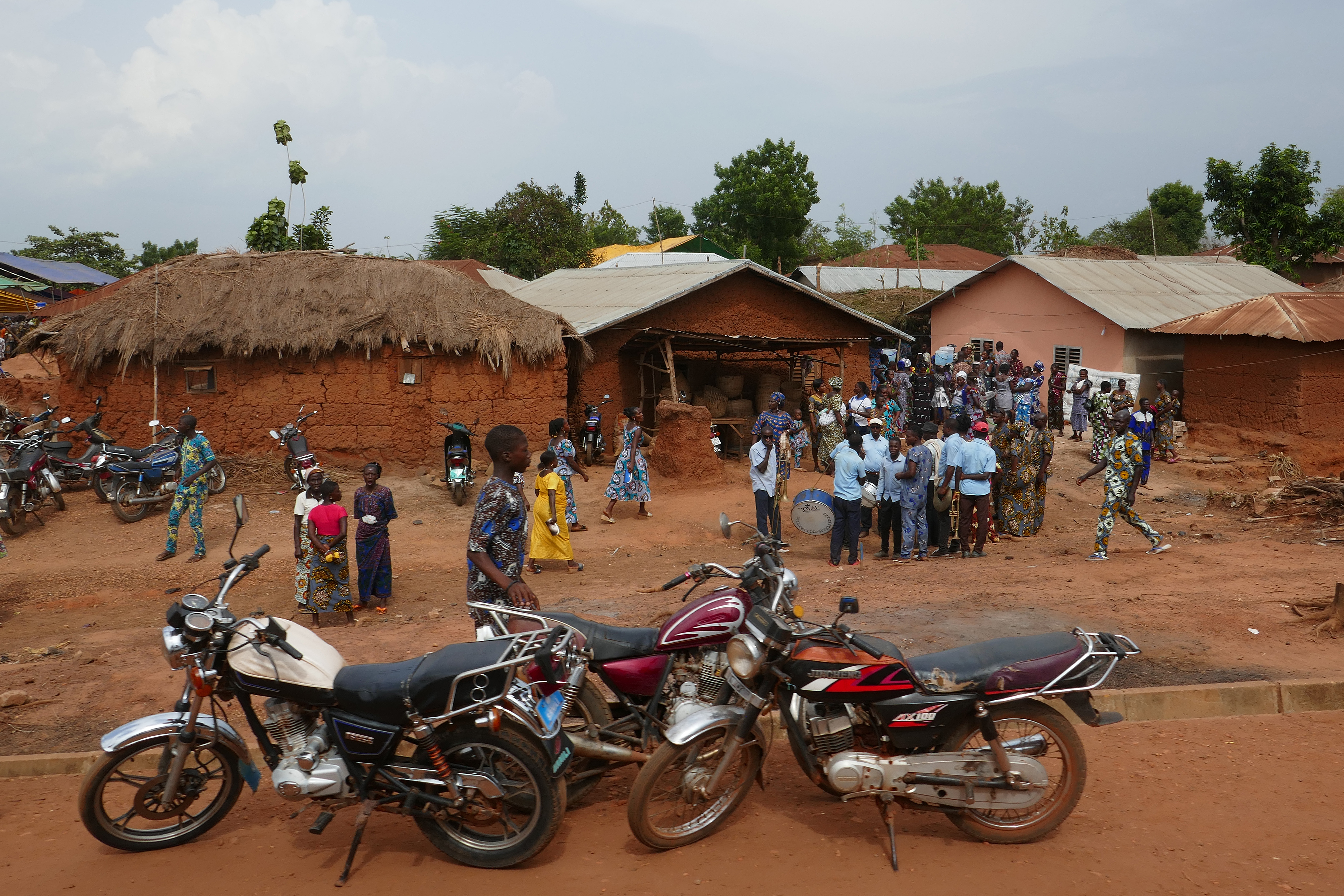 Lokossa (Bénin) : scène de rue.